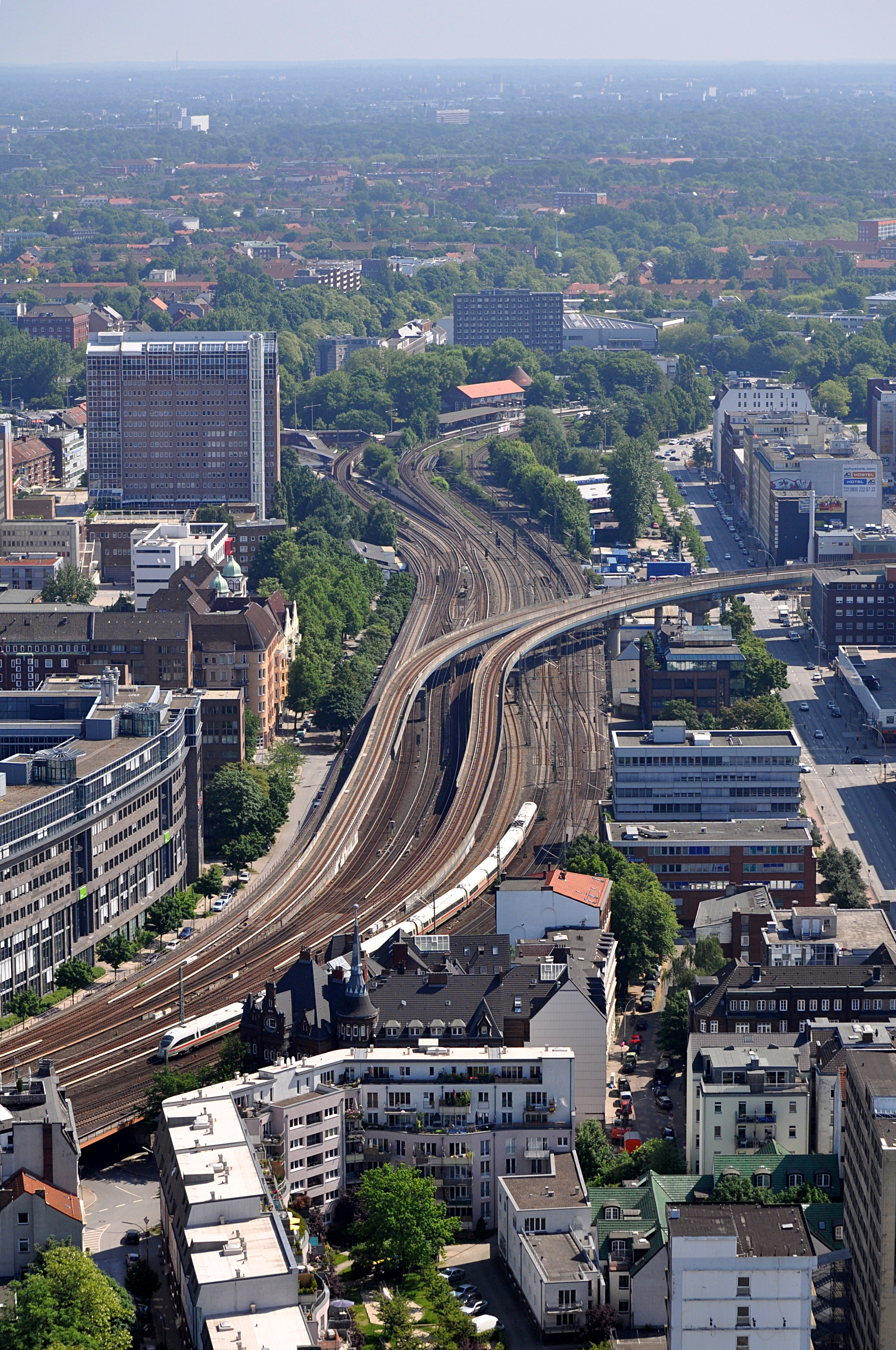 Ausfädelung der S-Bahnlinie S3 zwischen Hamburg-Hauptbahnhof und Berliner Tor.